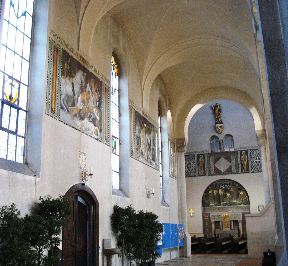 Stadtpfarrkirche Herz-Jesu Augsburg, Stadtteil Pfersee